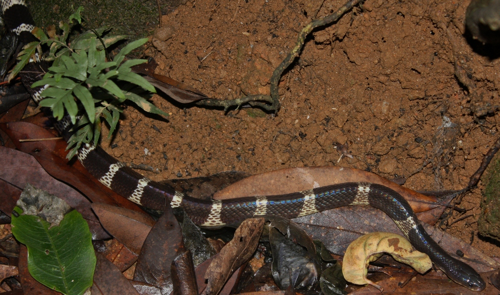 Taken at Tai Mo Shan.